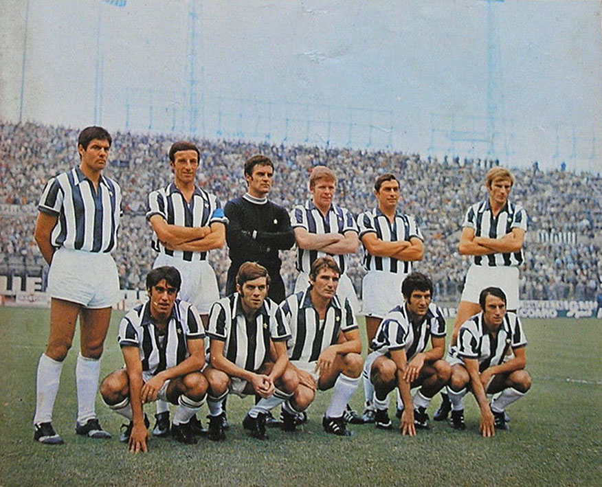 Una formazione della Juventus nella stagione 1969-70, in posa all'interno dello stadio Comunale di Torino. Da sinistra, in piedi: S Salvadore, E. Castano (capitano), R. Tancredi, H. Haller, L. Leonardi, F. Morini; accosciati: P. Anastasi, R. Vieri, G. Leoncini, S. Jacolino, G. Furino.